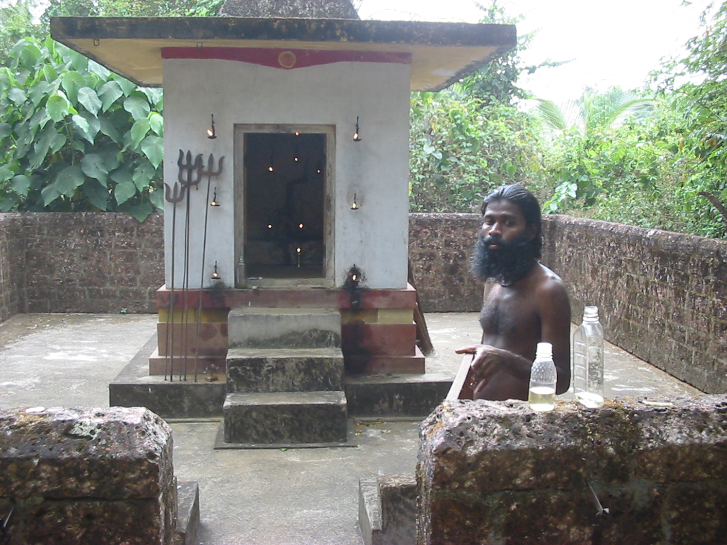 കാവും പരികർമ്മിയും